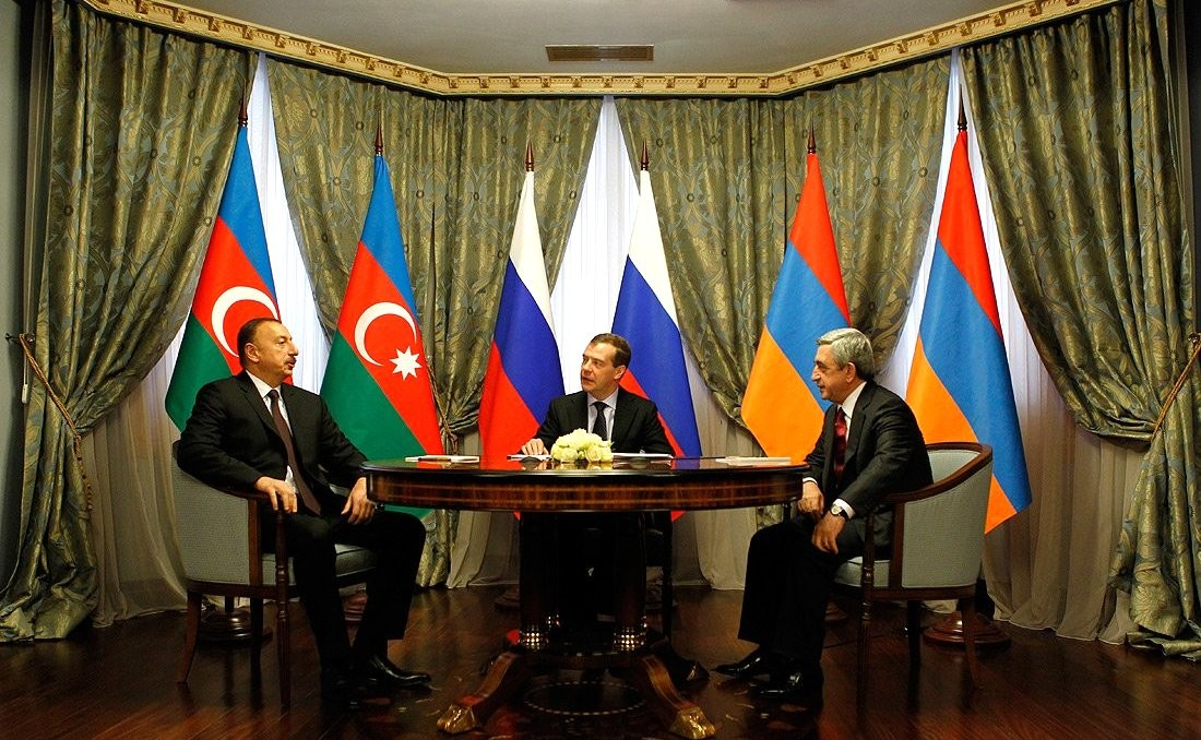 С Президентом Азербайджана Ильхамом Алиевым и Президентом Армении Сержем Саргсяном